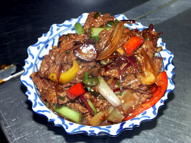 Neua pad prik (Thai pepper steak).